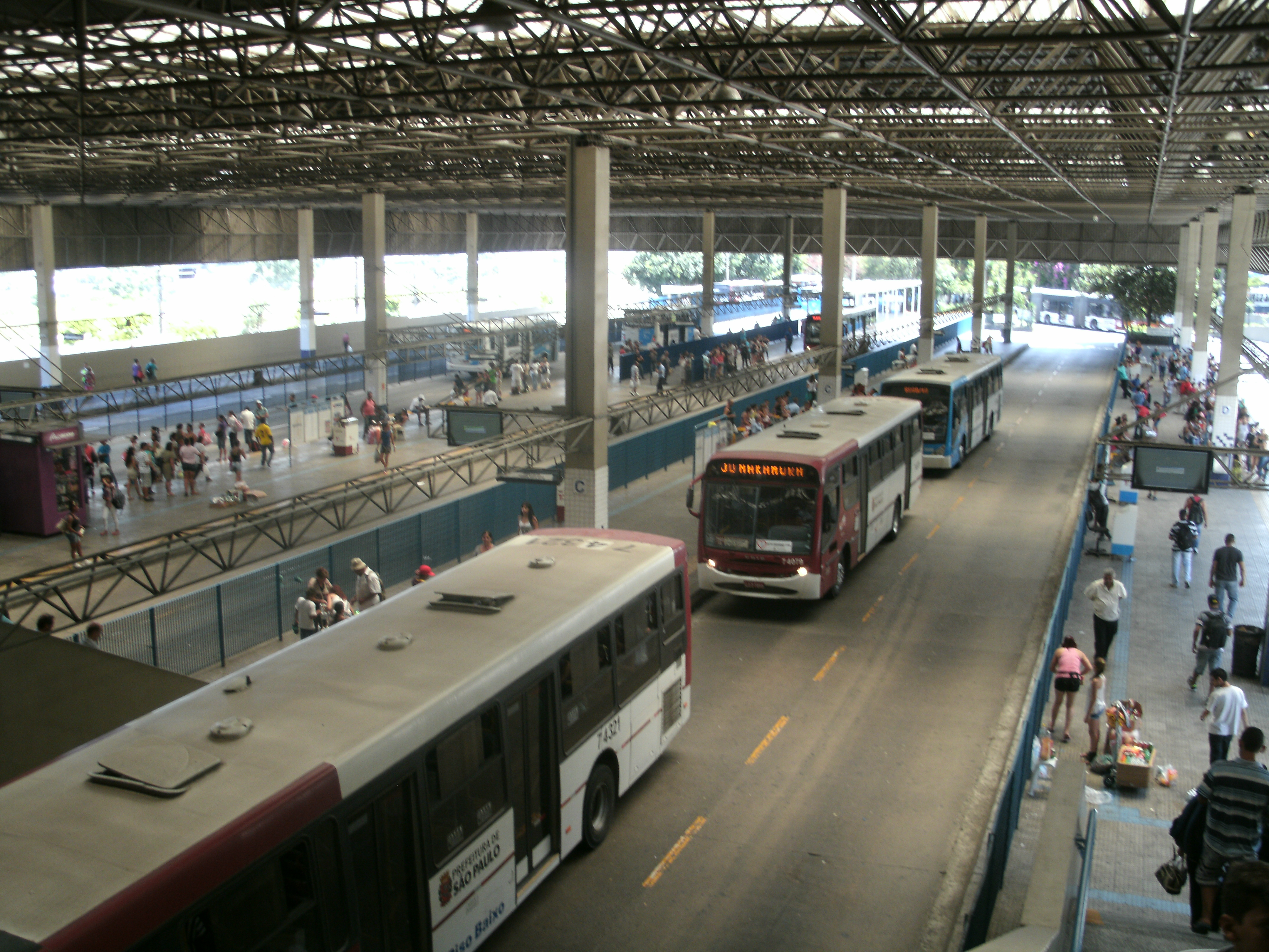 Terminal Santo Amaro